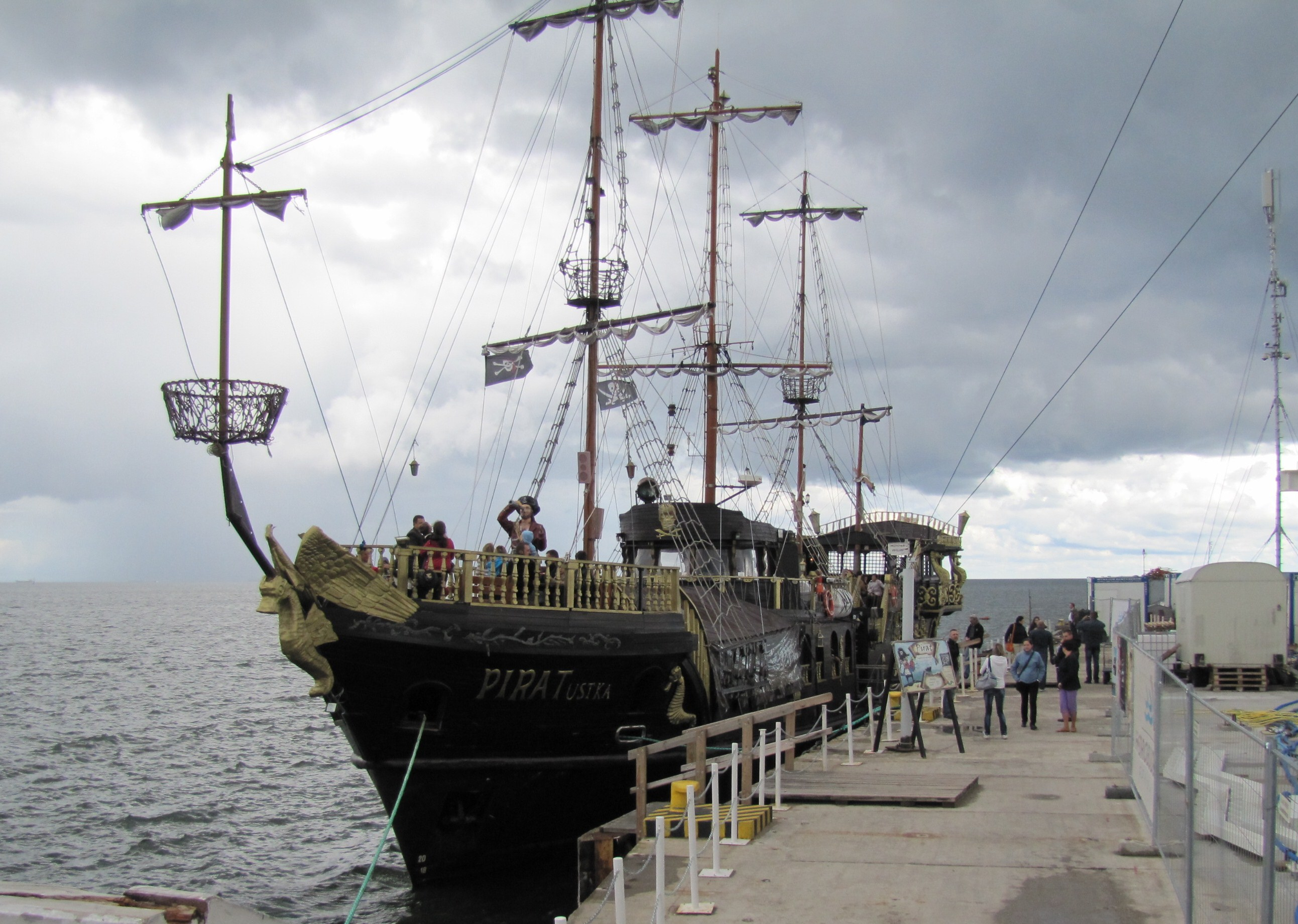 Statek wycieczkowy czeka na turystów.